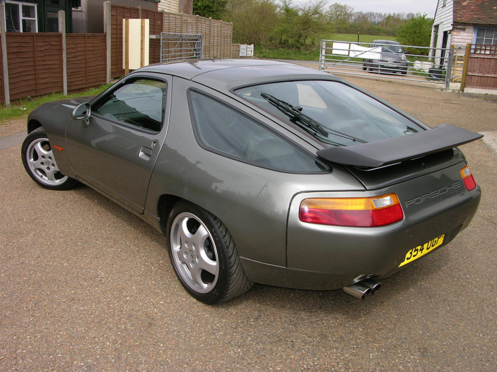 1987 Porsche 928 S4